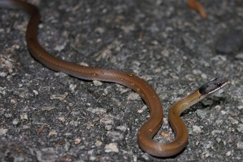 Taken in Sai Kung West Country Park.